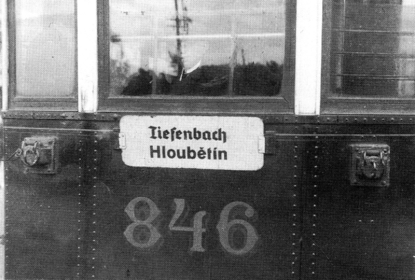 Česky: Důsledné uplatňování dvojjazyčných nápisů